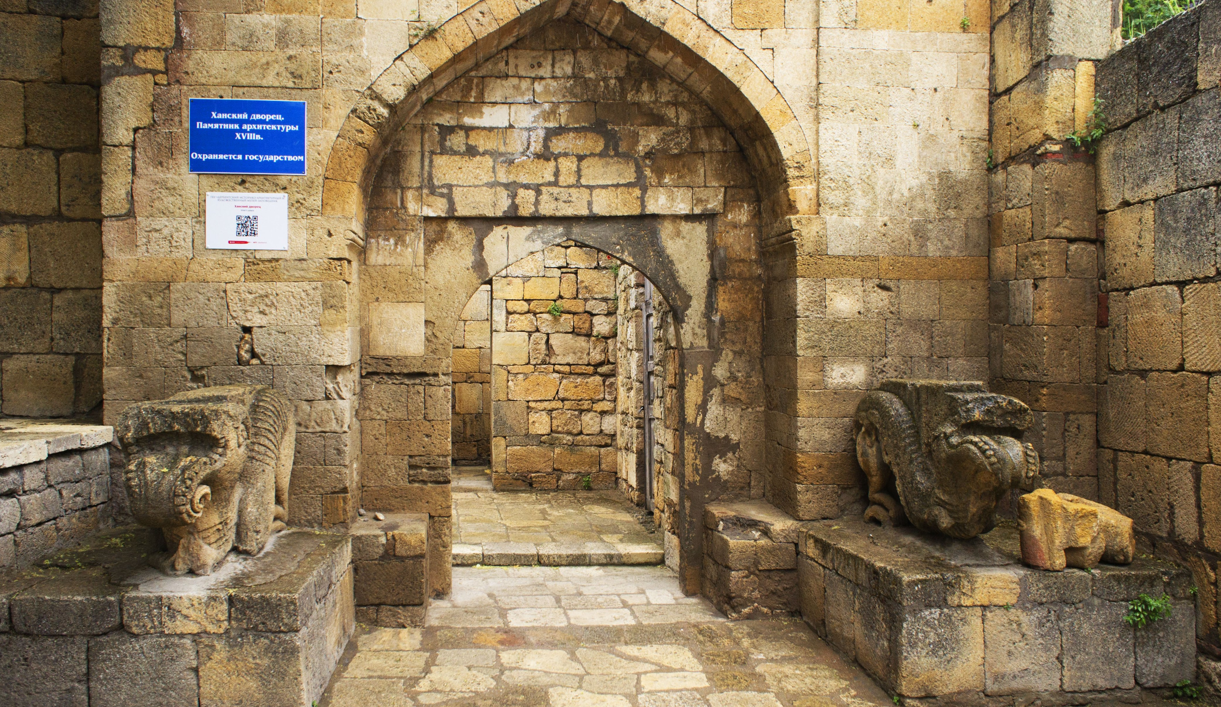 Дворец ханский: цитадель "Нарын-Кала", Дербент, Дагестан